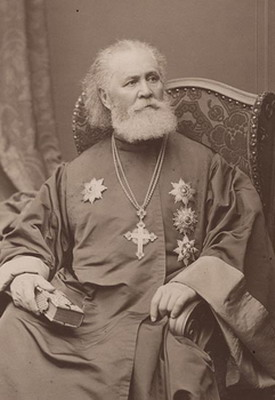 священник церквей при русских посольствах, общественный деятель славянофильского направления, панславист, почётный член Славянского благотворительного общества